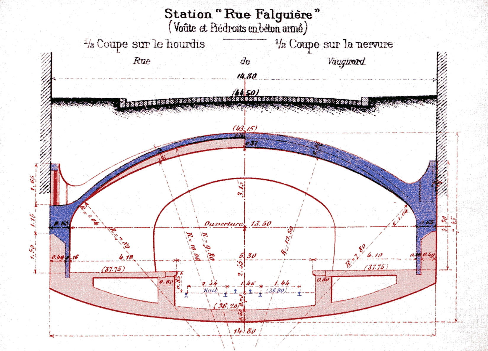 Ligne A du Nord-Sud (actuelle ligne 12 du métro de Paris), France. Coupe de la station Rue Falguière.